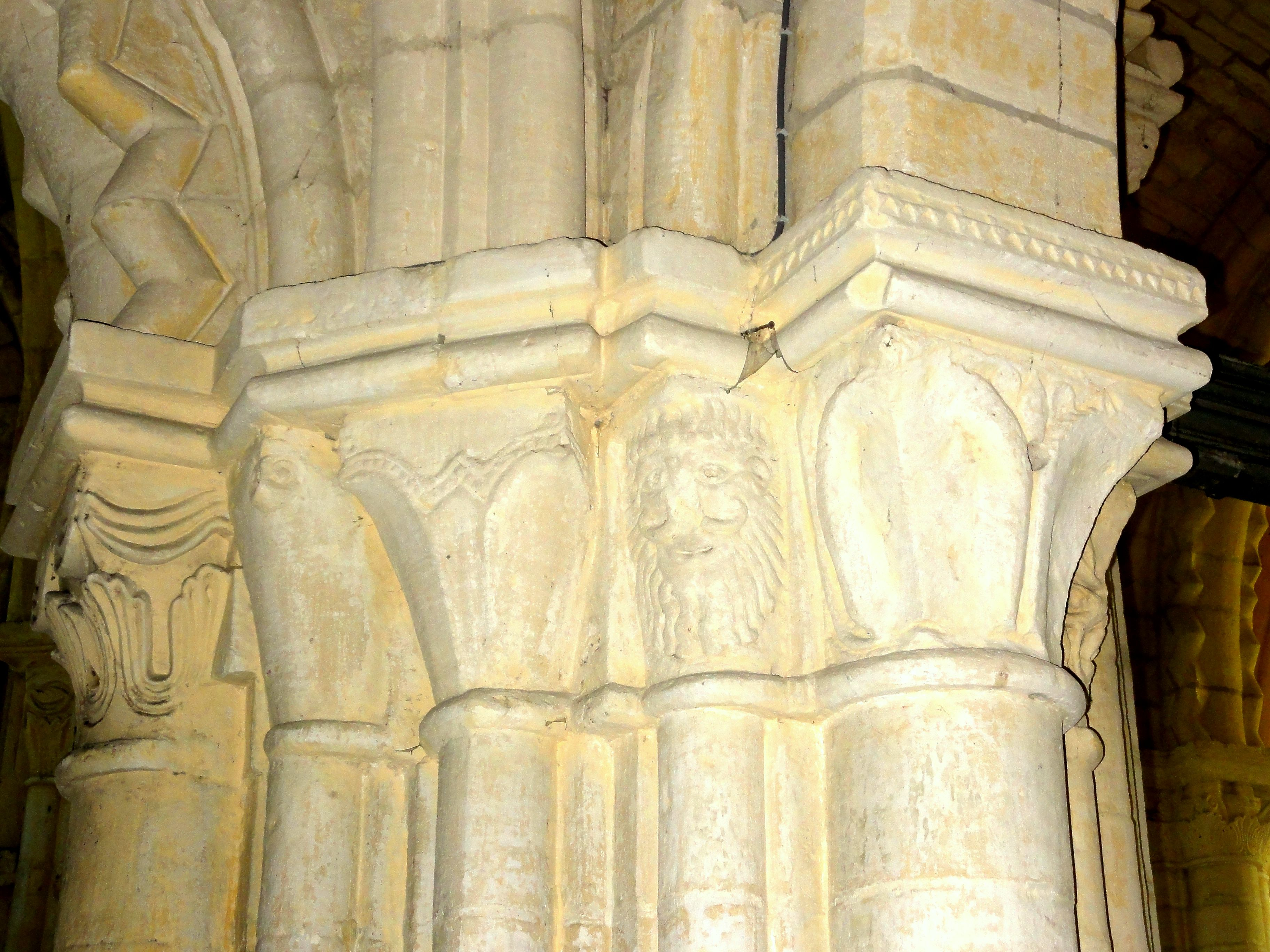 Bas-côté nord, 2e travée, chapiteaux dans l'angle SE (pile NO de la croisée).